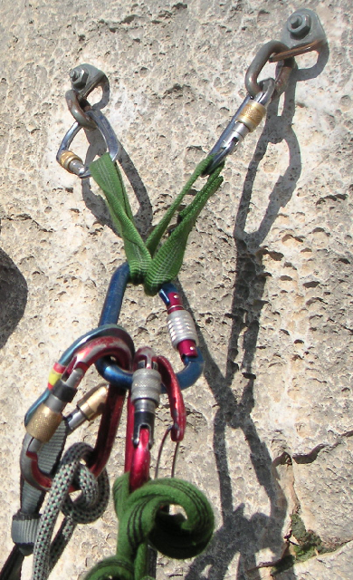 Stand mit Kräftedreieck, eingehängten Selbstsicherungen und Nachstiegsicherung